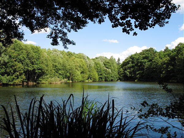 Der Hubertussee in Berlin-Frohnau, Jahr 2008.